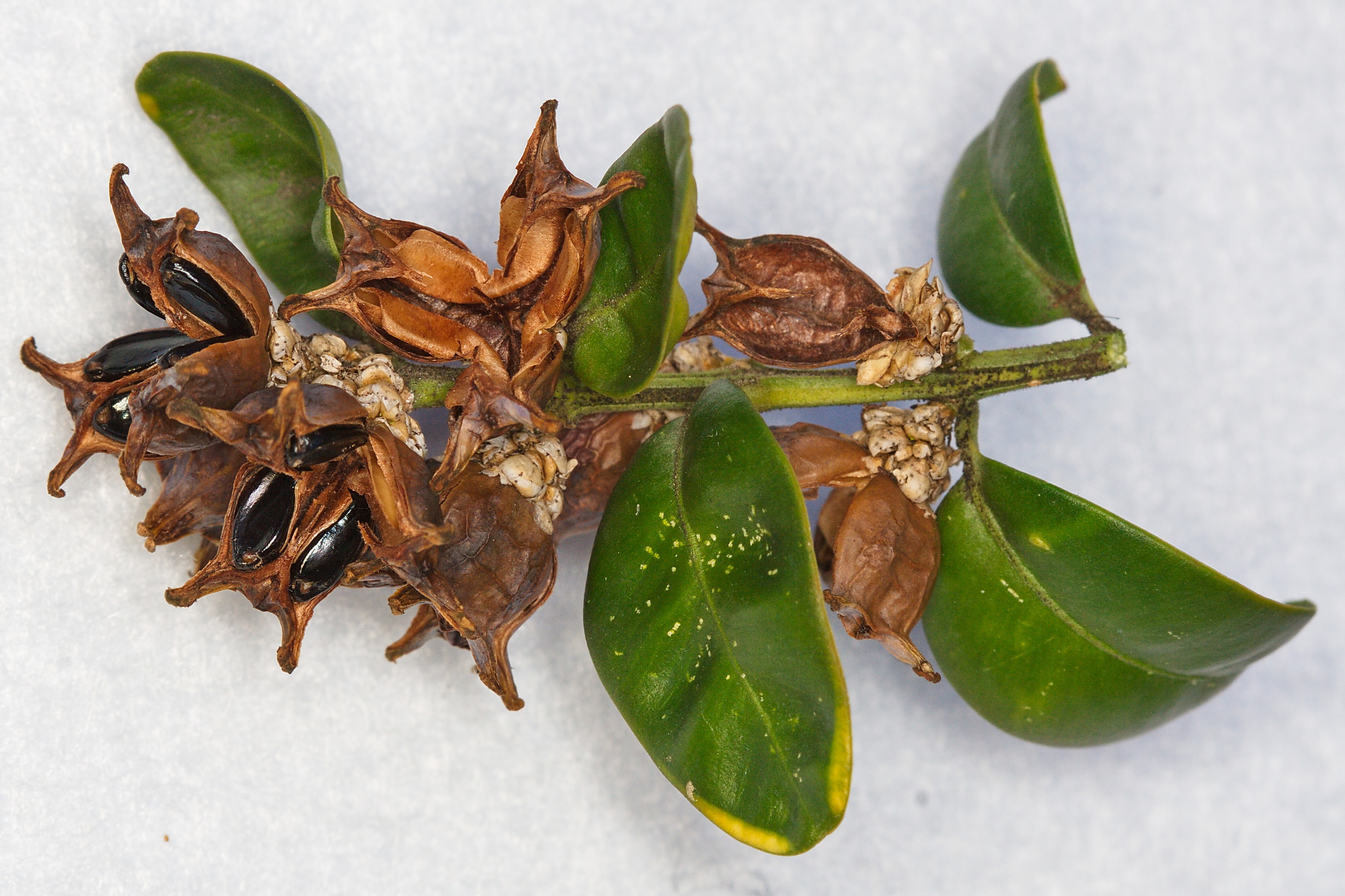 Reife Samenkapseln an Gewöhnlicher Buchsbaum (Buxus sempervirens)